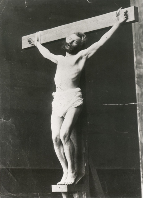 Munkácsy a keresztfán 1883 körül de Suse márki felvétele